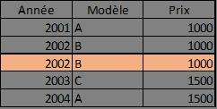 Exemple de doublons de données dans une feuille de calculs Excel